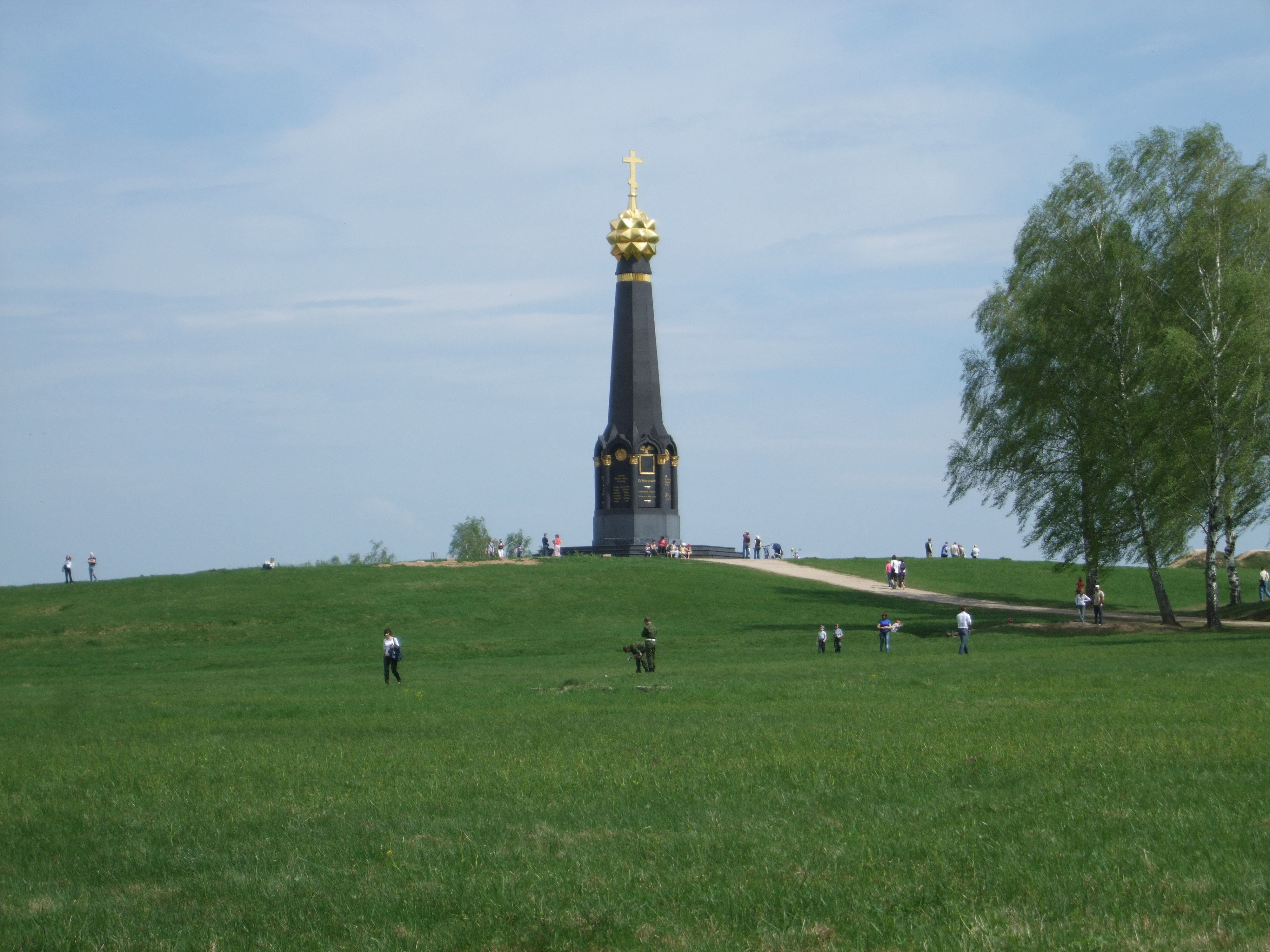 Главный монумент, у батареи Раевского, во время праздничного концерта с участием Сергея Трофимова в честь Дня Победы (которая в 1945 году)